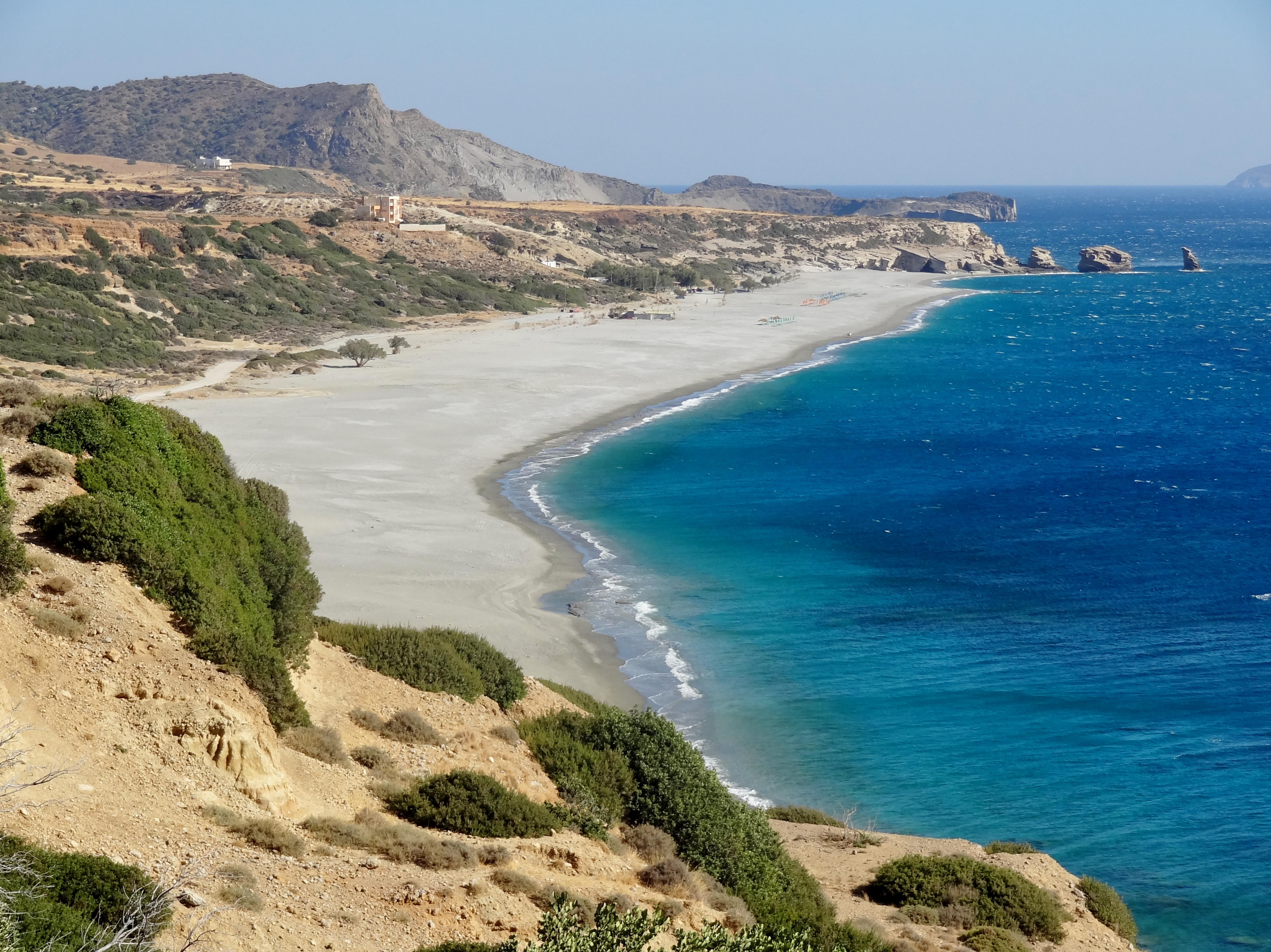 Strand von Triopetra (Τριόπετρα), Regionalbezirk Rethymno, Kreta, Griechenland